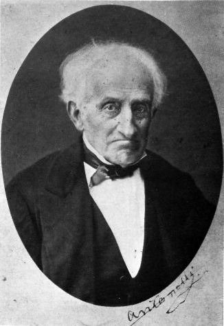 Alessandro Antonelli (1798-1888), Italian architect